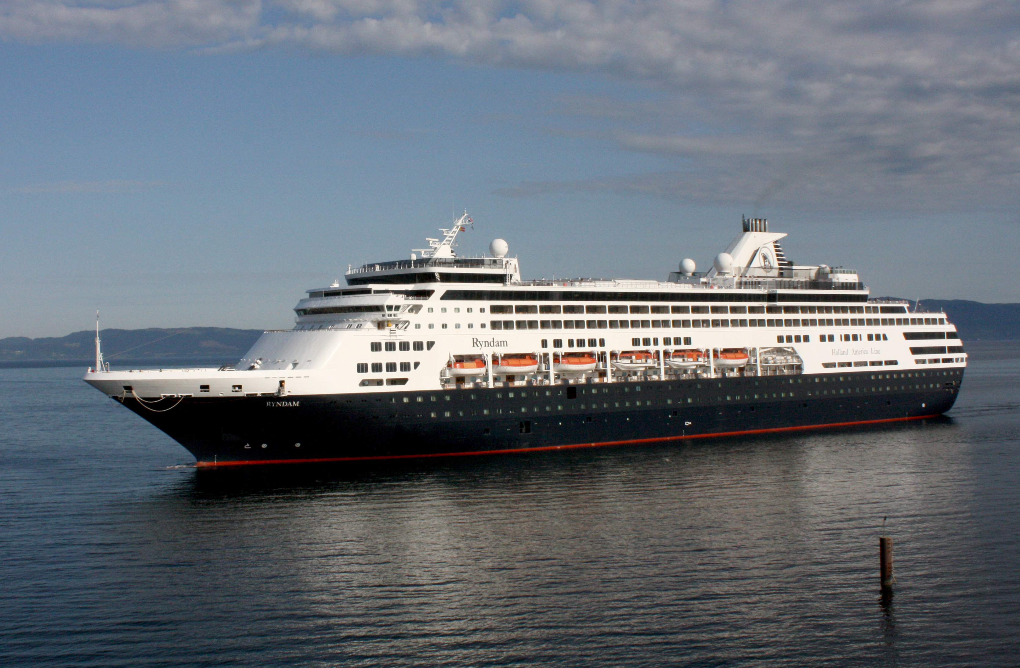 Cruiseskipet Ryndam i Trondheim sommeren 2014.